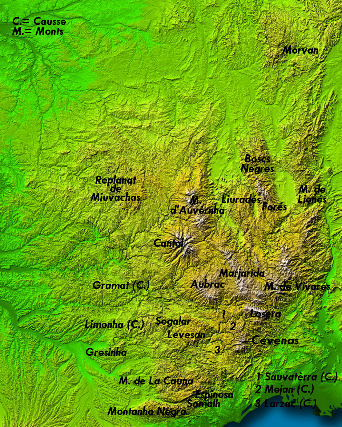 Las "montanhas de Massis Central". Fichièr qu'ai fach, totalament liure de drech